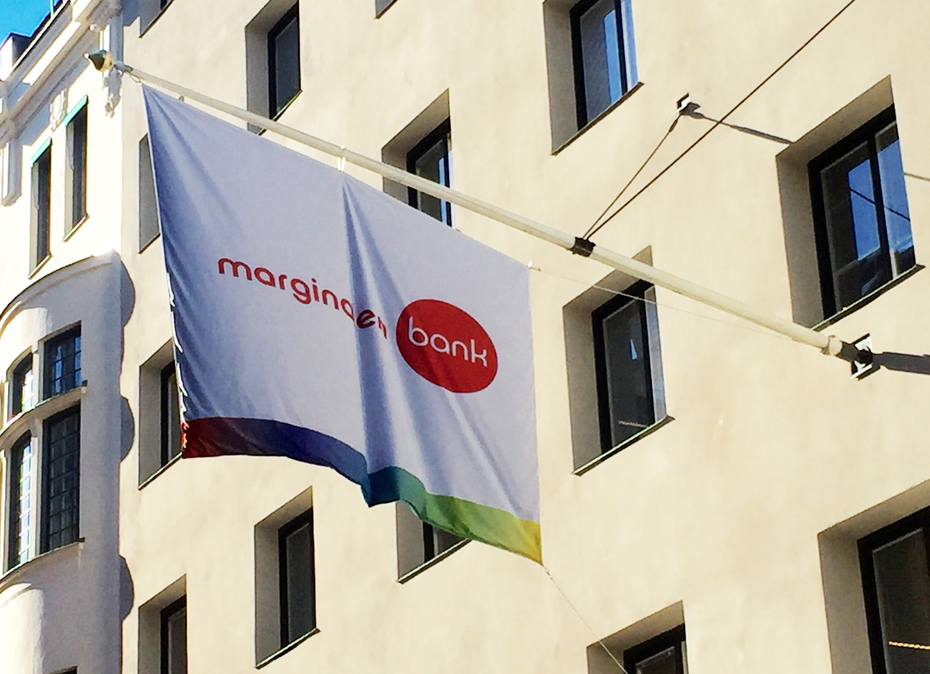 Marginalen Bank, flagga på huvudkontoret på Adolf Fredriks kyrkogata 8.